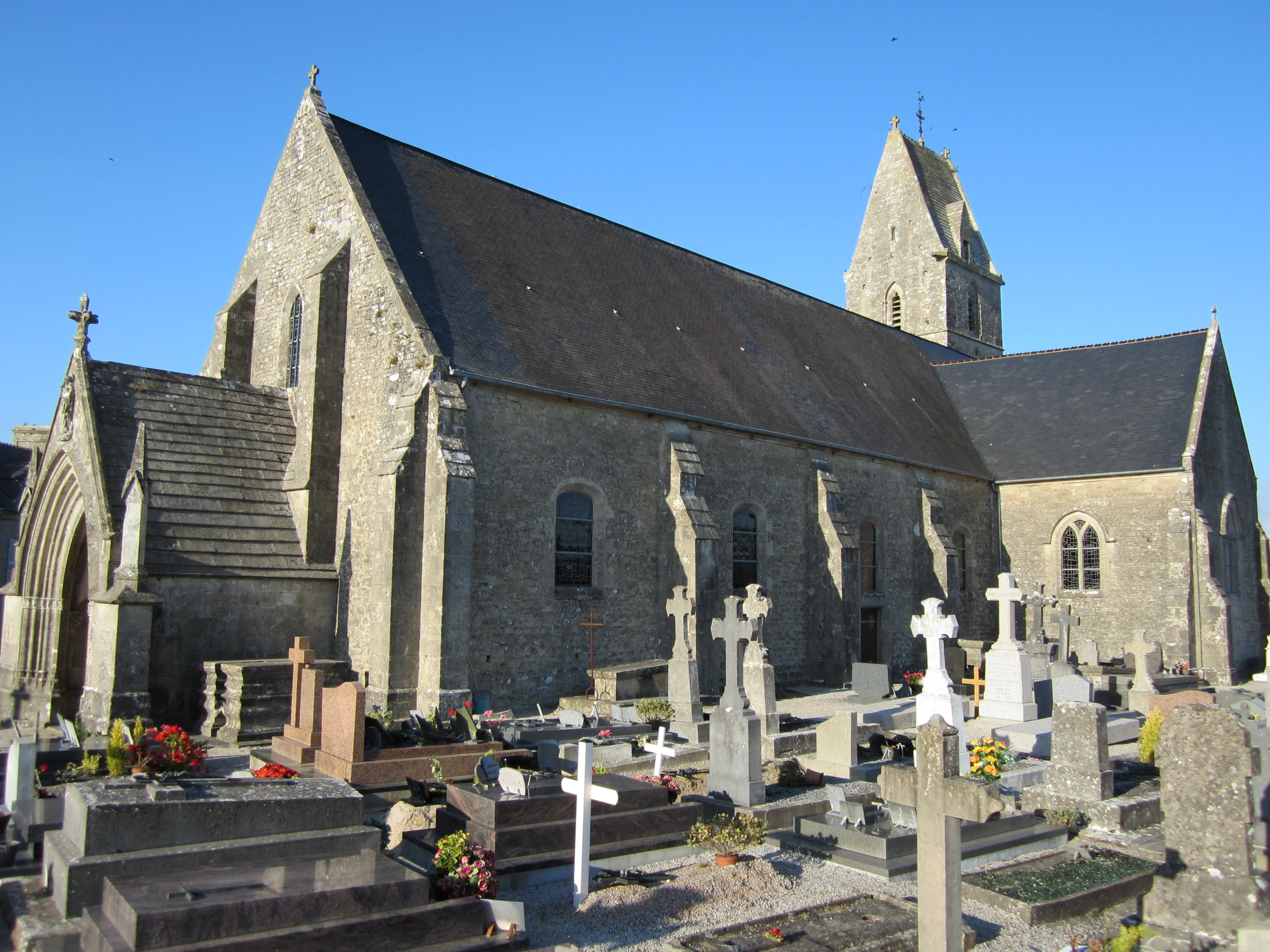 Église Saint-Georges d'Yvetot-Bocage .